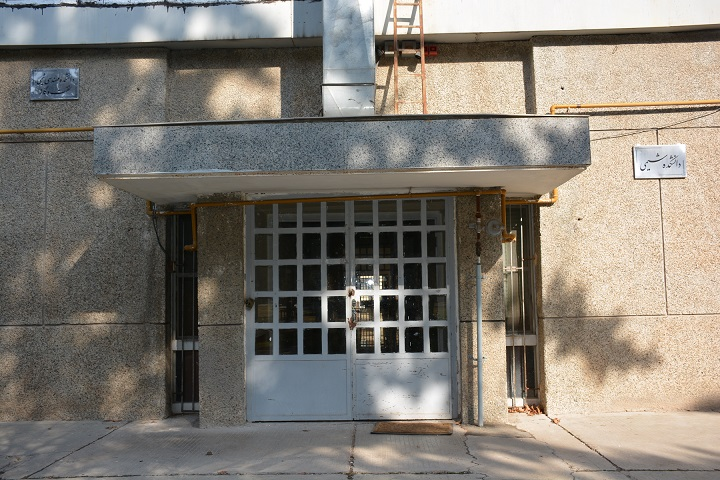 دانشکده شیمی و مهندسی شیمی دانشگاه صنعتی شیراز